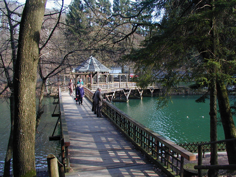 Uelfebad, Radevormwald, 2002 selbstf otografiert, GFDL